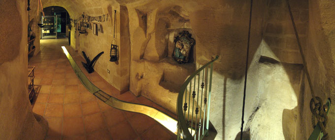 I Sassi di Matera,fondano la loro esistenza su di un articolato sistema di Raccolta delle Acque. Nel 1999 in via Purgatorio vecchio n. 12, a seguito di un primo restauro di quella che si scoprì essere la casa natale di San Giovanni da Matera, vengono scoperte una serie di cisterne e canali di adduzione dell'acqua, Vincenzo Altieri